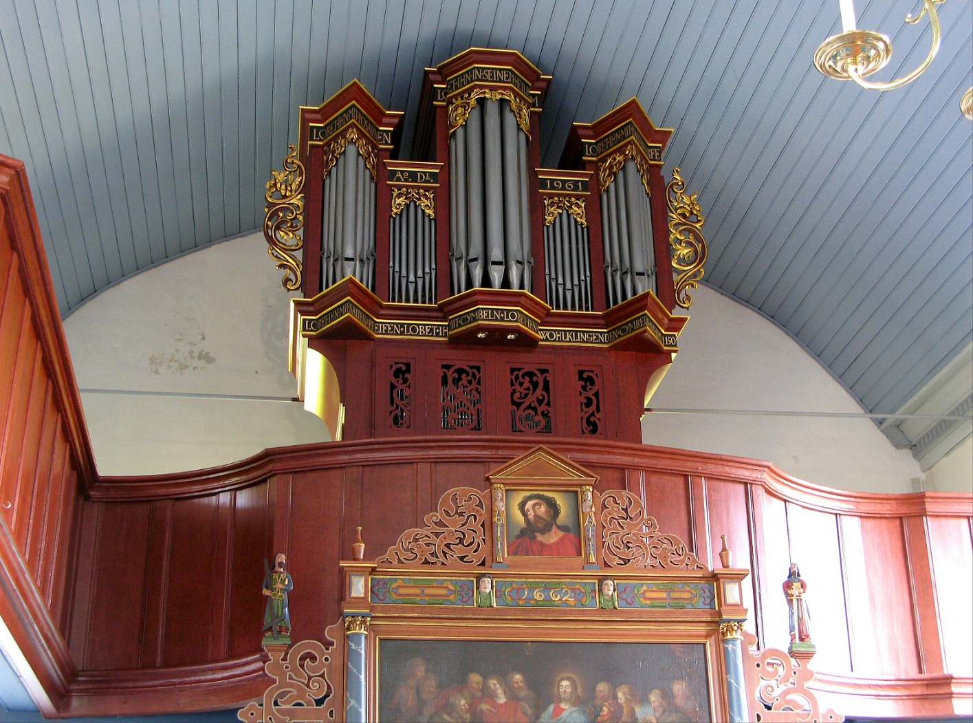 Orgel in Hesel, Landkreis Leer